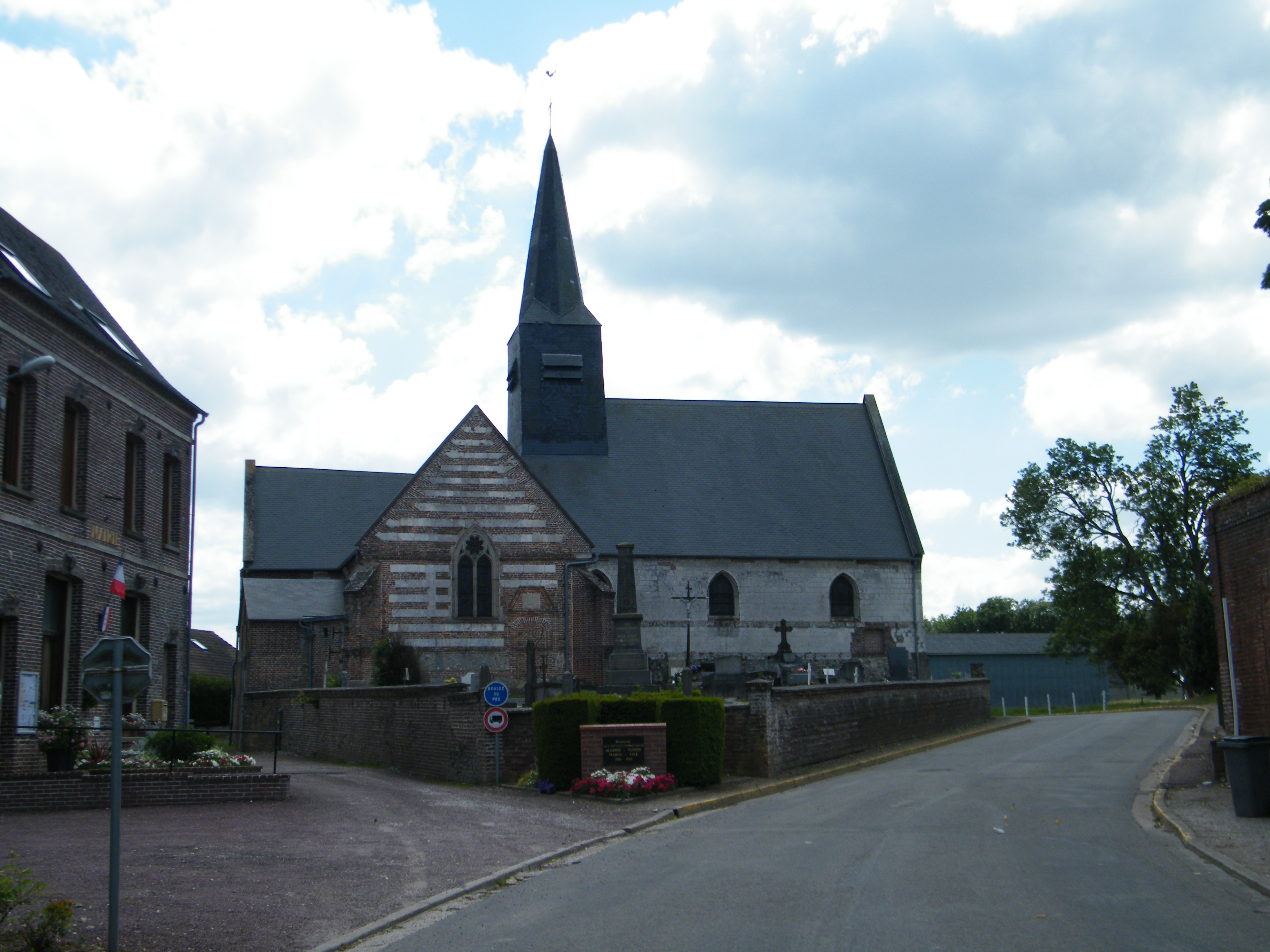 L'église.